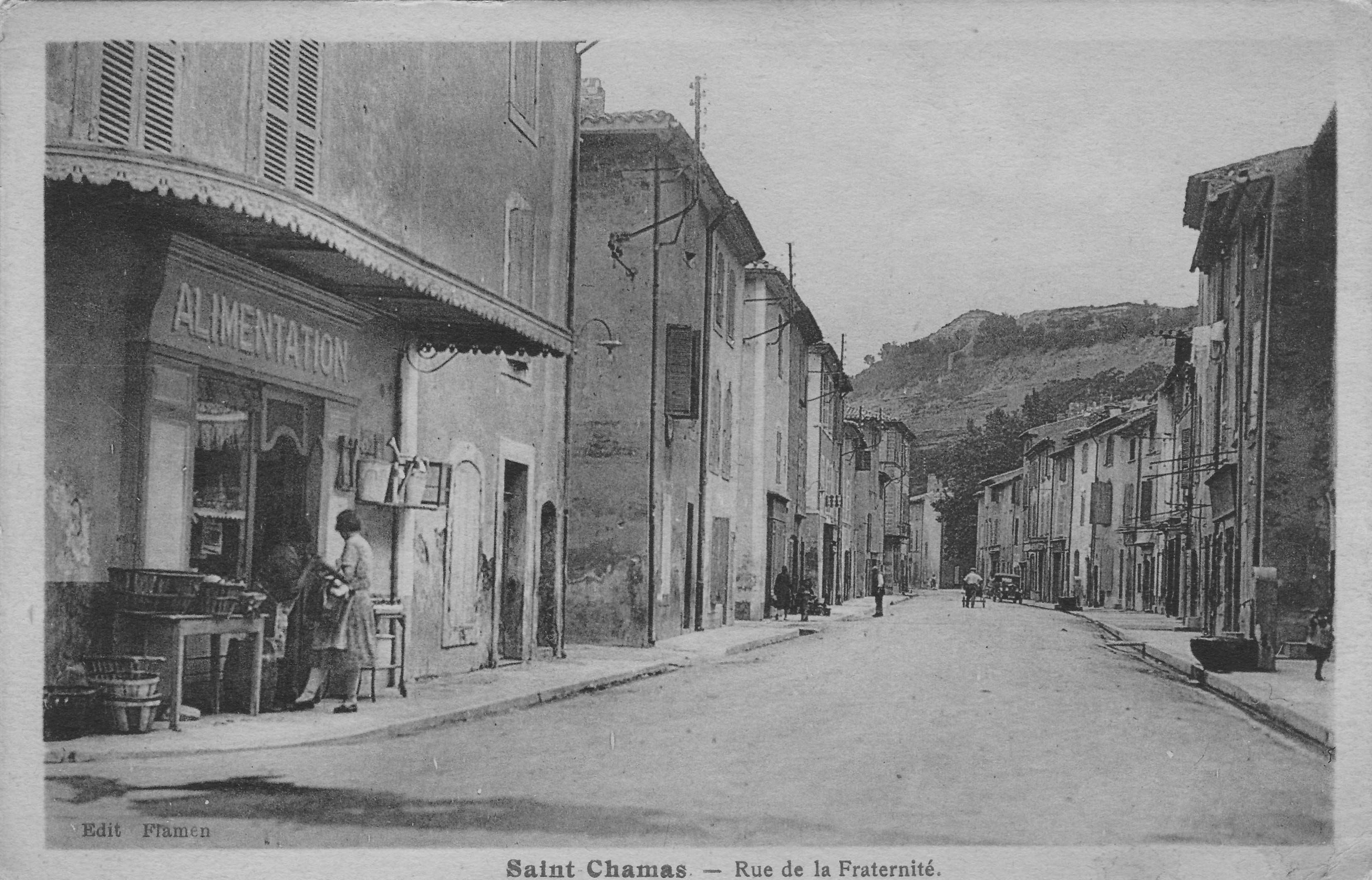 Carte postale ancienne montrant la rue de la fraternité à Saint-Chamas